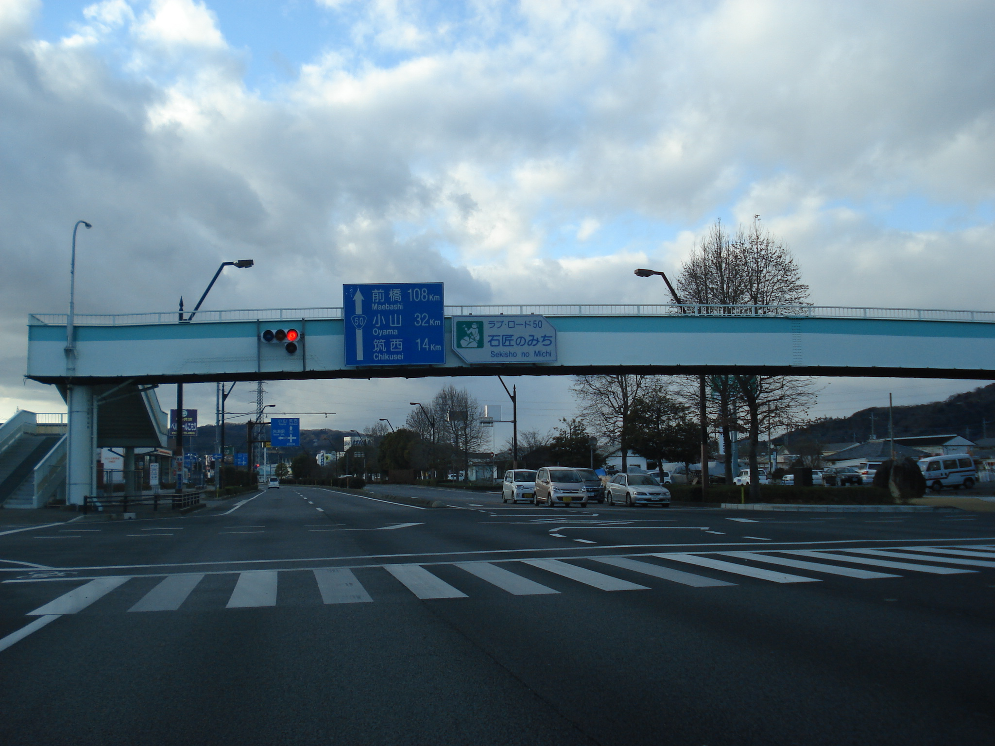 国道50号 岩瀬バイパス 茨城県桜川市